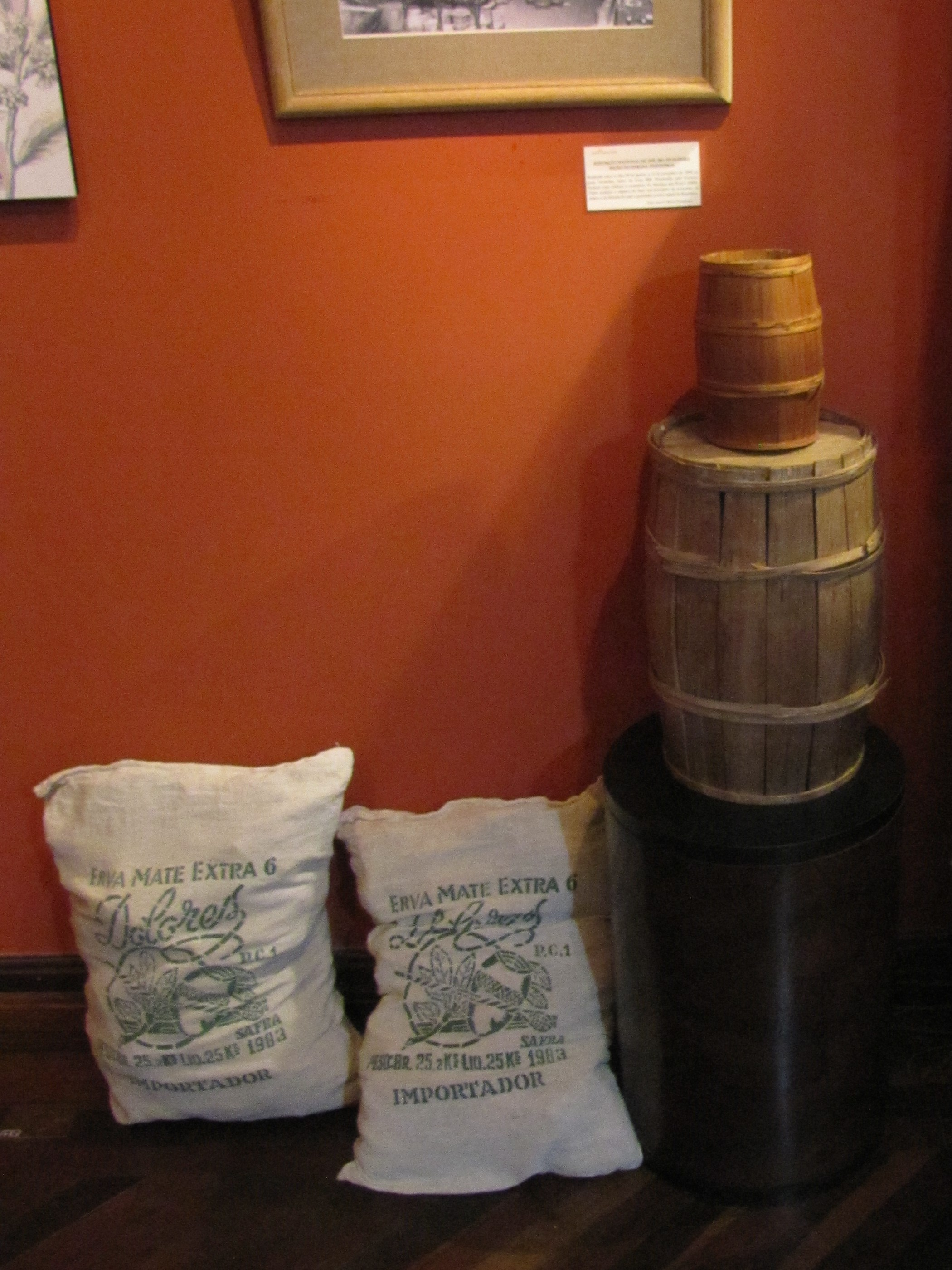 Sacos e barricas, antigos recipientes para o transporte da erva-mate.